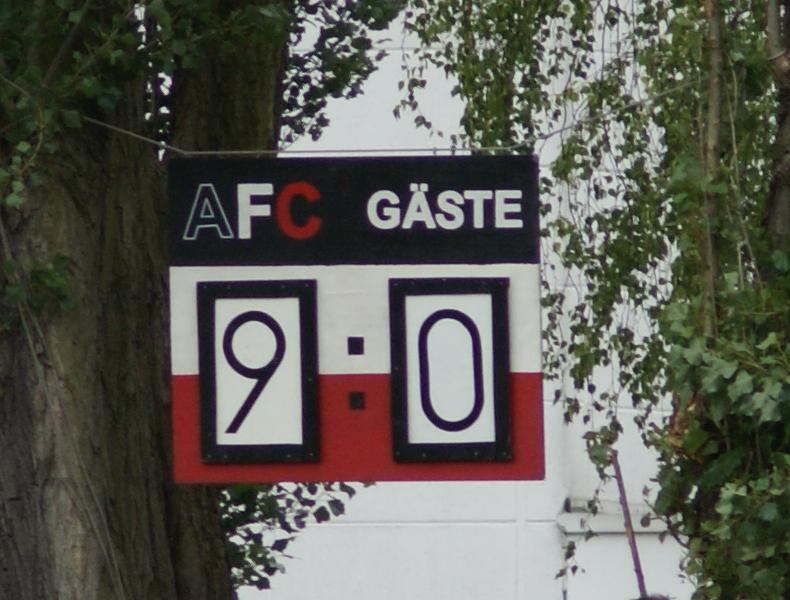 Anzeigentafel - Fotografiert beim Spiel gegen Bergedorf 85